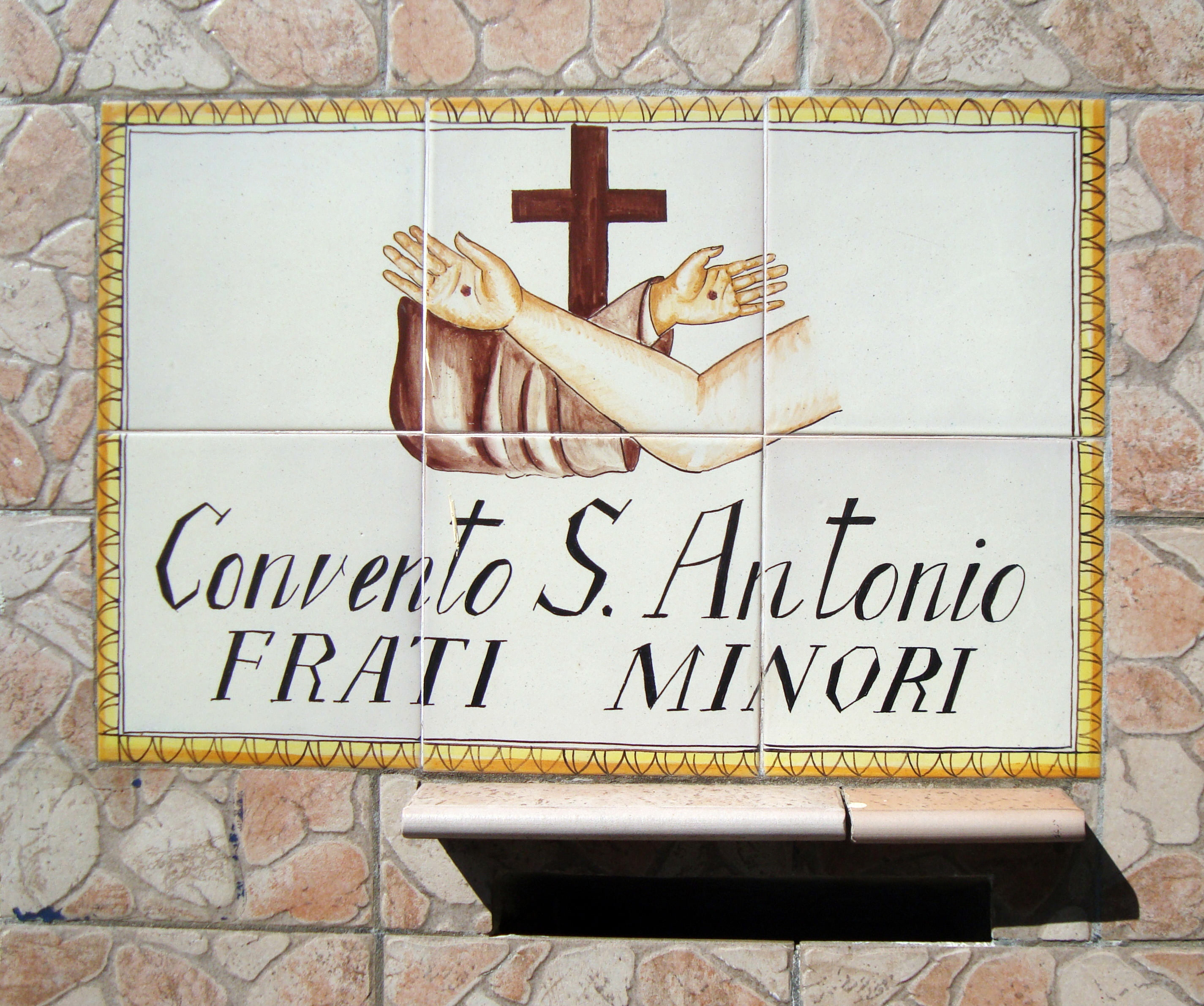 targhetta presente all'ingresso del convento di Sant'Antonio ad Ischia, sito in località la Mandra.